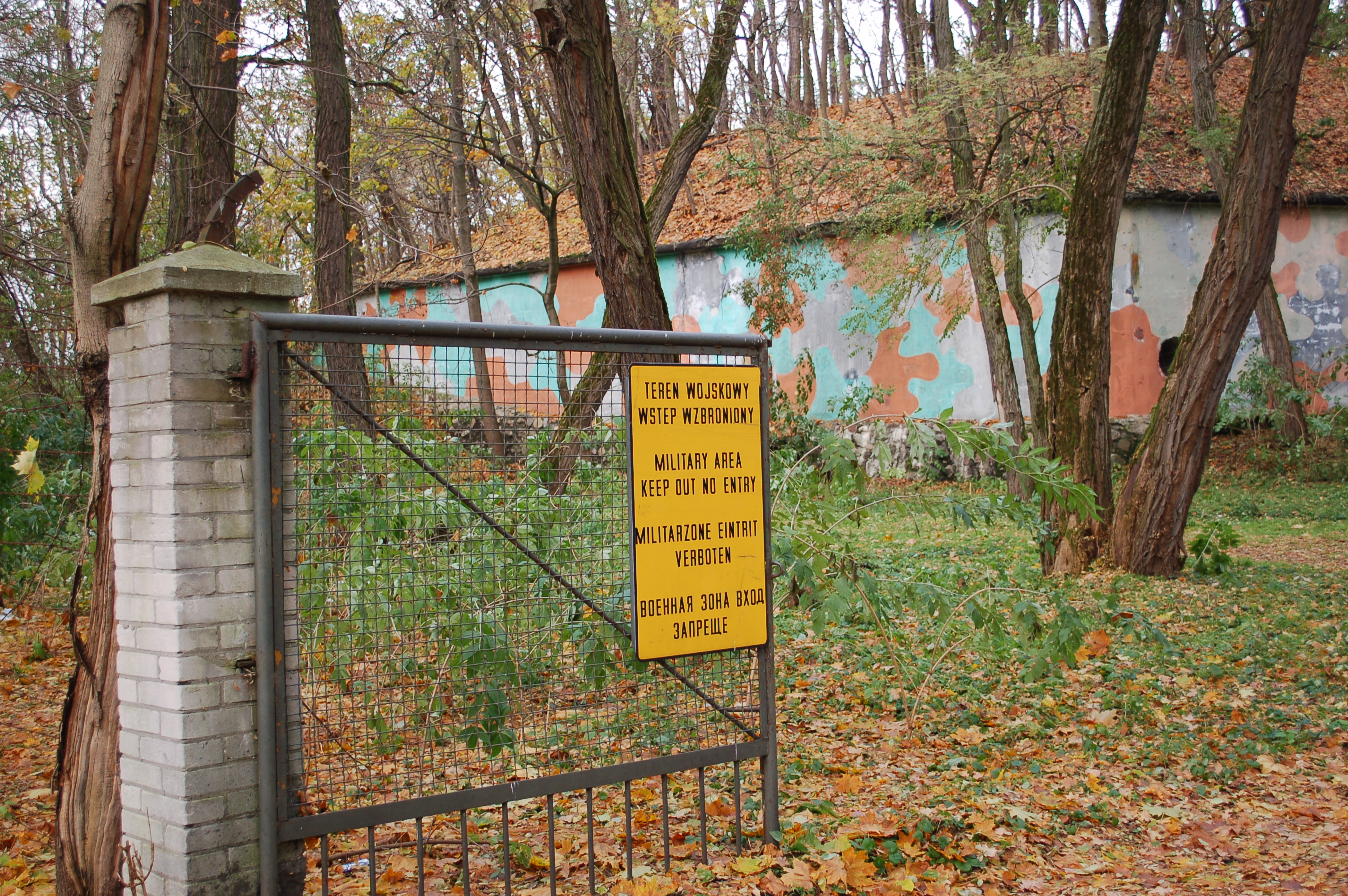 Zegrze small fortification